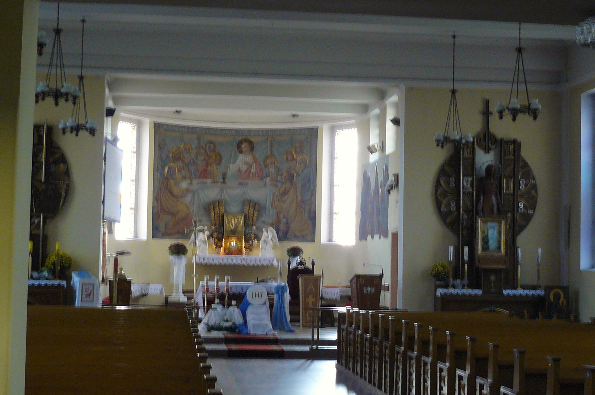 Kościół p.w. Bożego Ciała w Nowych Skalmierzycach.